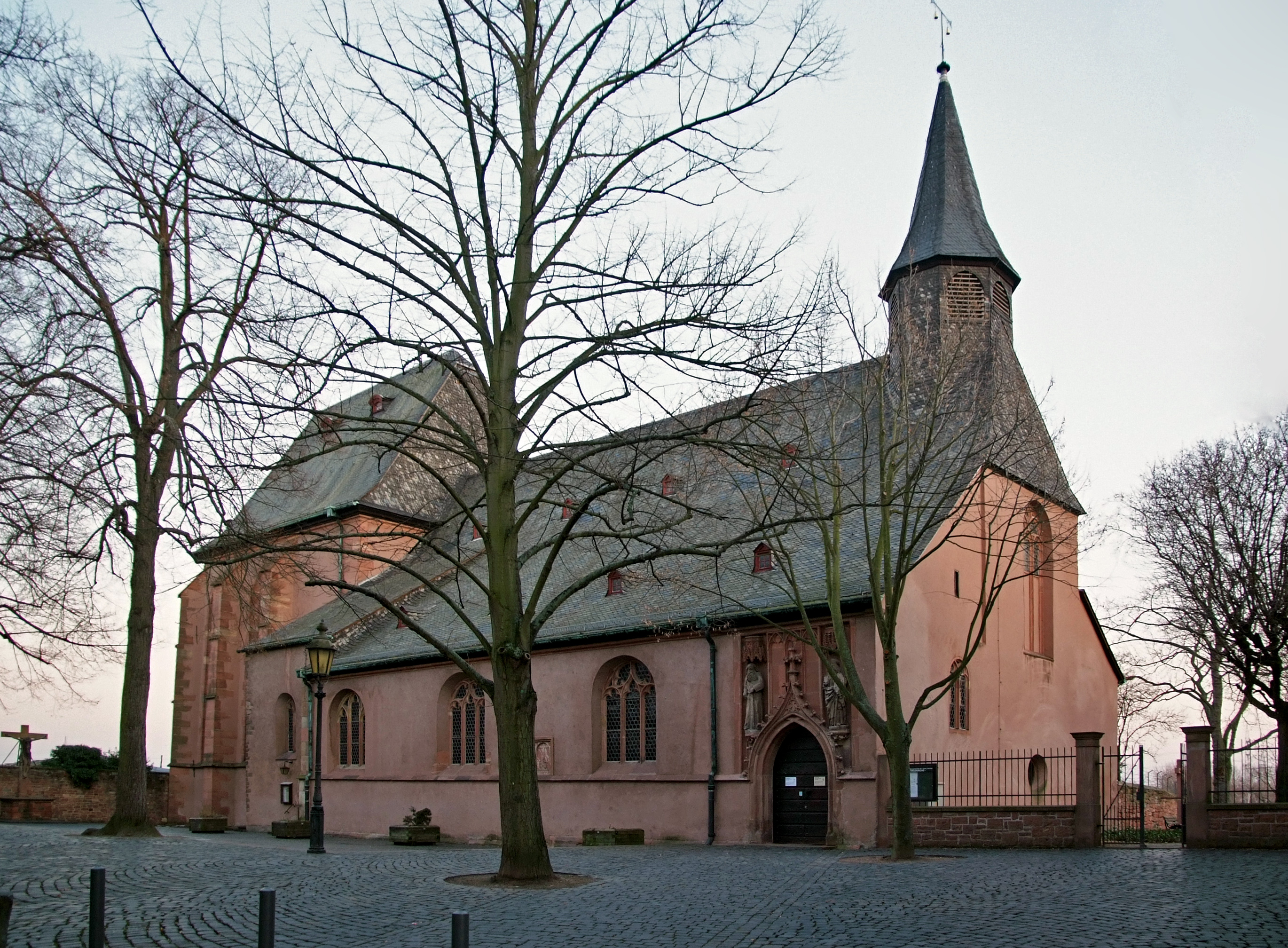 Justinuskirchplatz und Nordfassade der Justinuskirche